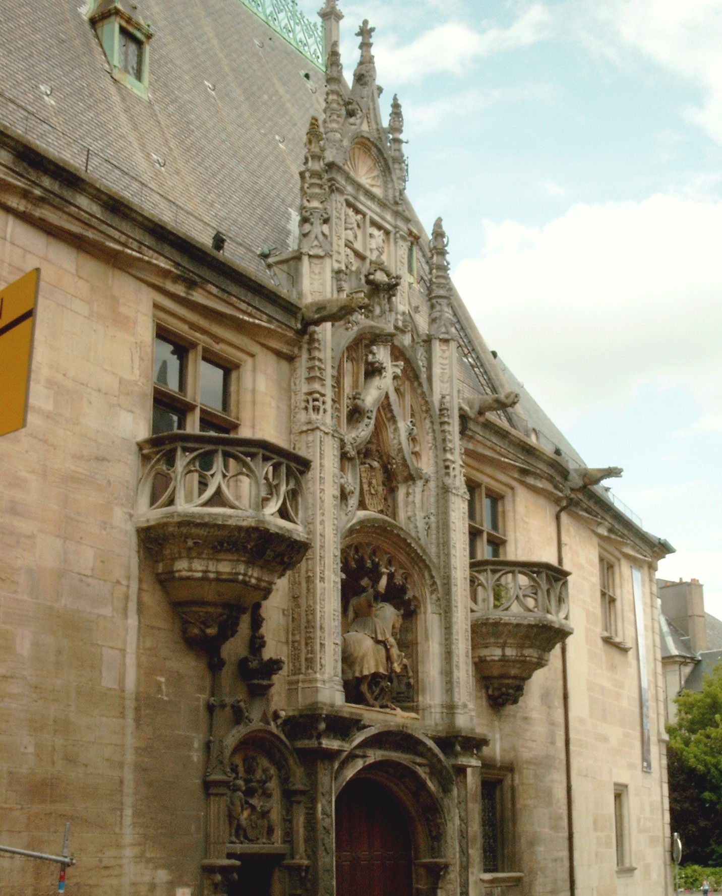 Le Palais Ducal à Nancy